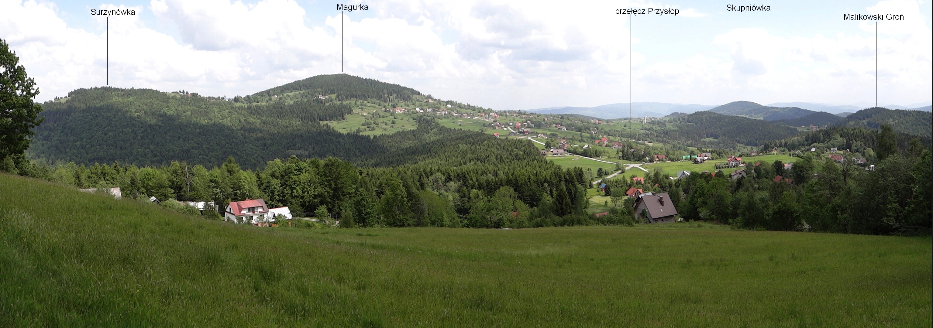 Widok ze stoków Kiczory